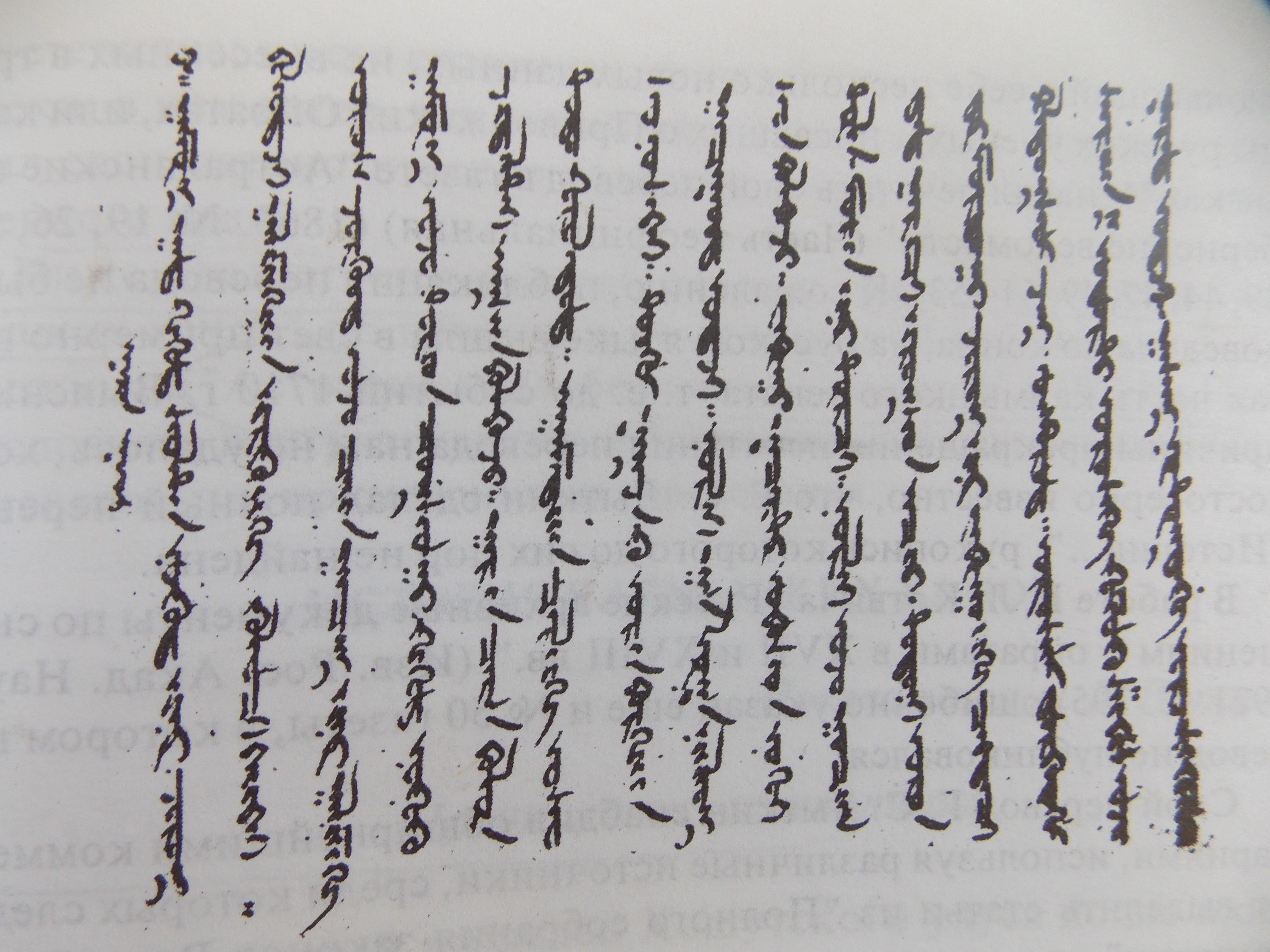 Рукопись "Краткая история калмыцких ханов". Лист 2, Библиотека Восточного факультета СПбГУ